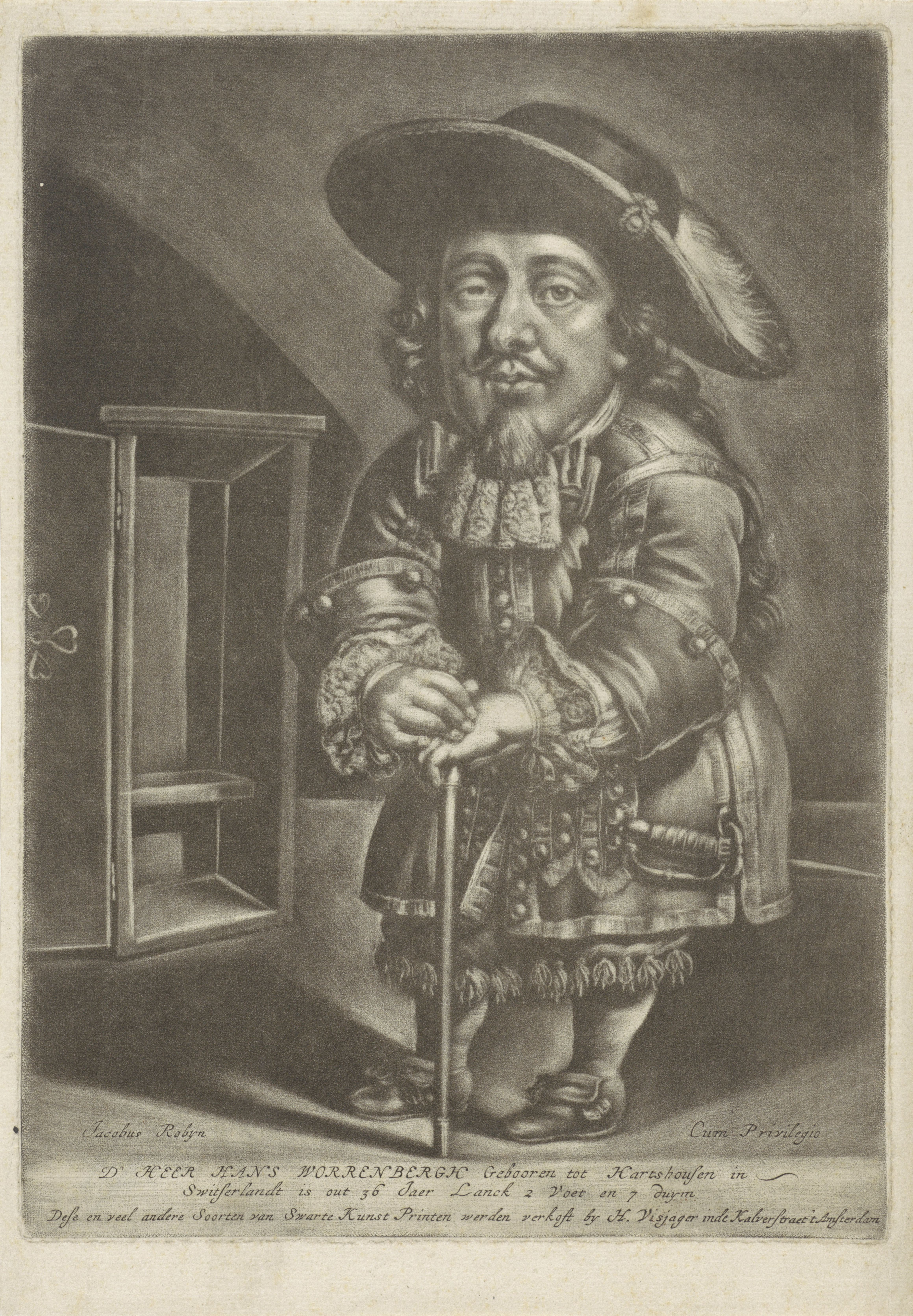 IdentificatieTitel(s): Portret van Hans WorrenberghObjecttype: prent Objectnummer: RP-P-1910-1550Catalogusreferentie: Hollstein Dutch 9-2(2)Opschriften / Merken: verzamelaarsmerk, verso, gestempeld: Lugt 2228Omschrijving: De Zwitserse dwerg Hans Worrenbergh op 36-jarige leeftijd. Hij leunt op zijn stok. In de marge zijn naam, titels, leeftijd en zijn lengte.VervaardigingVervaardiger: prentmaker: anoniemuitgever: Jacobus Robijn (vermeld op object)uitgever: Hendrik Visjager (vermeld op object)verlener van privilege: anoniem (vermeld op object)Plaats vervaardiging: AmsterdamDatering: 1676 - 1700 en/of 1683 - 1684Fysieke kenmerken: mezzotintMateriaal: papier Techniek: mezzotintAfmetingen: plaatrand: h 267 mm × b 191 mmOnderwerpWat: dwarfsWie: Hans WorrenberghVerwerving en rechtenVerwerving: aankoop 1910Copyright: Publiek domein